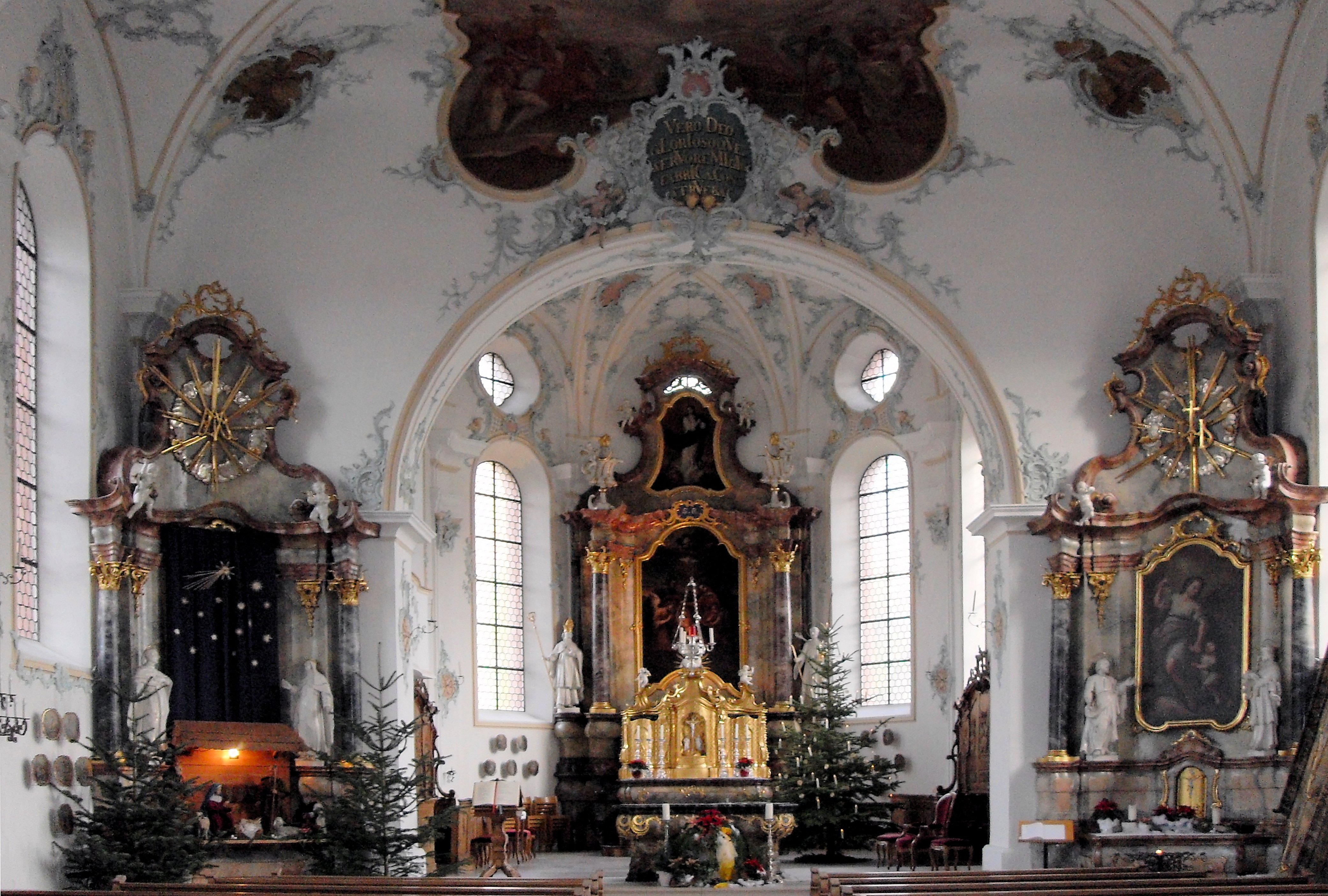 Innenansicht der Pfarrkirche St. Remigius in Mettau, Kanton Aargau, Schweiz